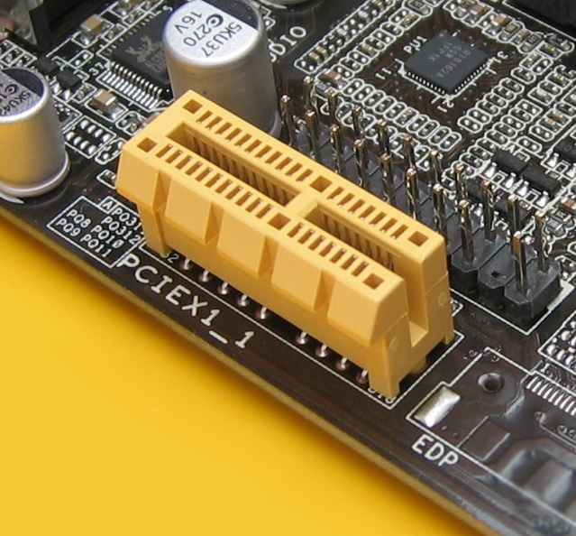 PCIe-Schacht für variable Busbreiten auf ITX Mainboard J1900 SoC